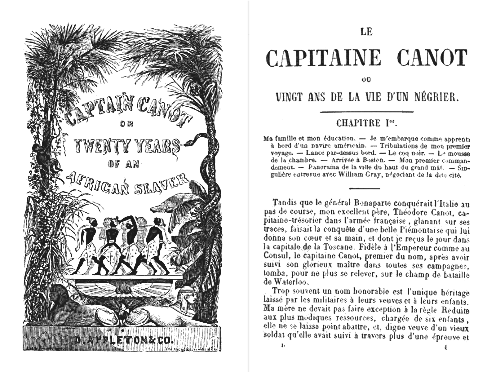 Captain Canot, Vingt ans de la vie d'un négrier, Image composée à partir de deux images,frontispice de Brantz Mayer.- Captain Canot : or, Twenty years of an African Slaver: being an account of his career and adventures on the coast, in the interior, on shipboard, and in the West Indies, written out and edited from the Captain's journals, memoranda and conversations, D. Appleton and Company, New-York, 1854Page 1 de Théophile Conneau, Brantz Mayer (1809-1879).- Vingt années de la vie d'un négrier, Amyot, Paris, 1860.